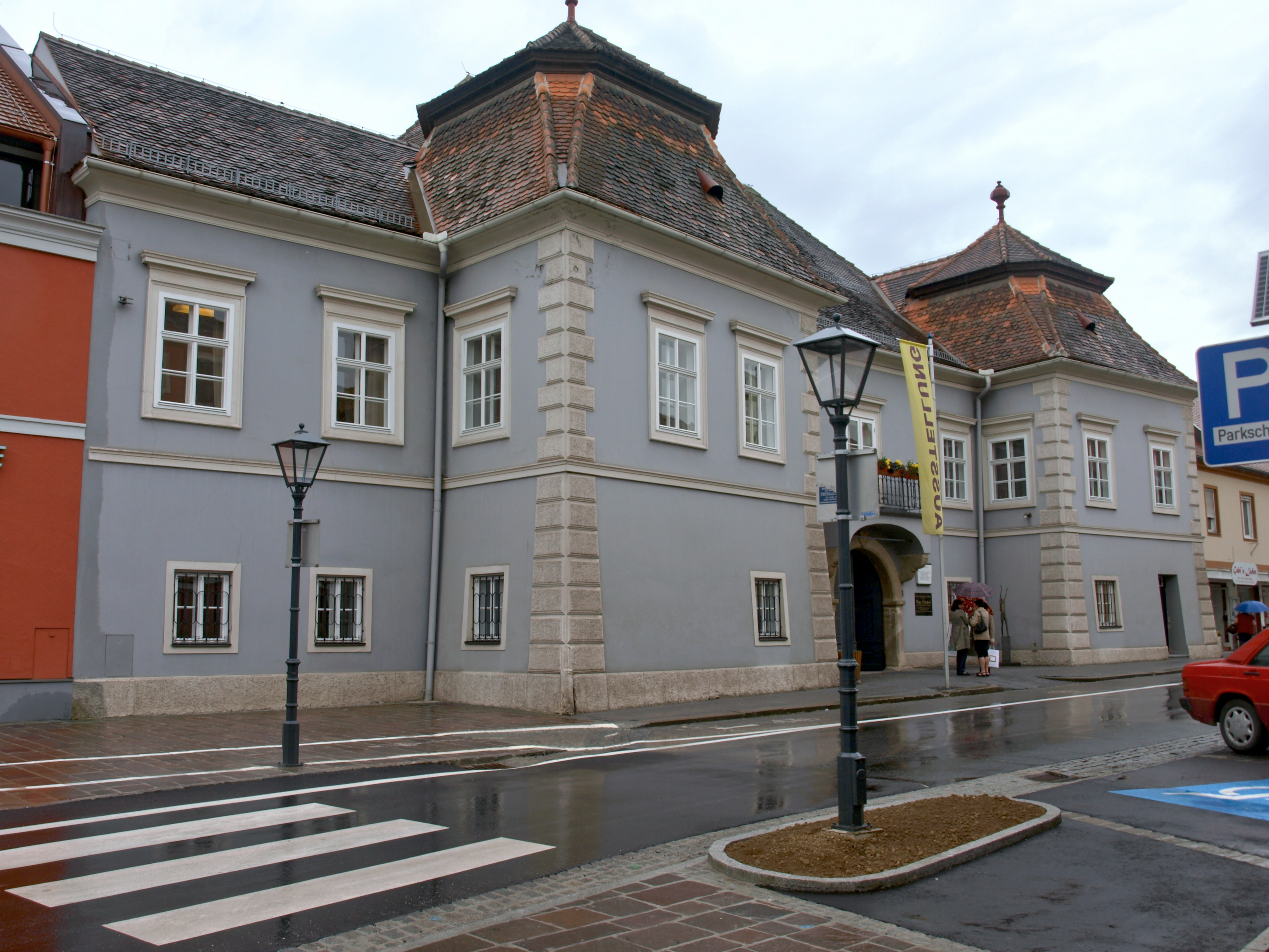 Altes Rathaus, Musikschule